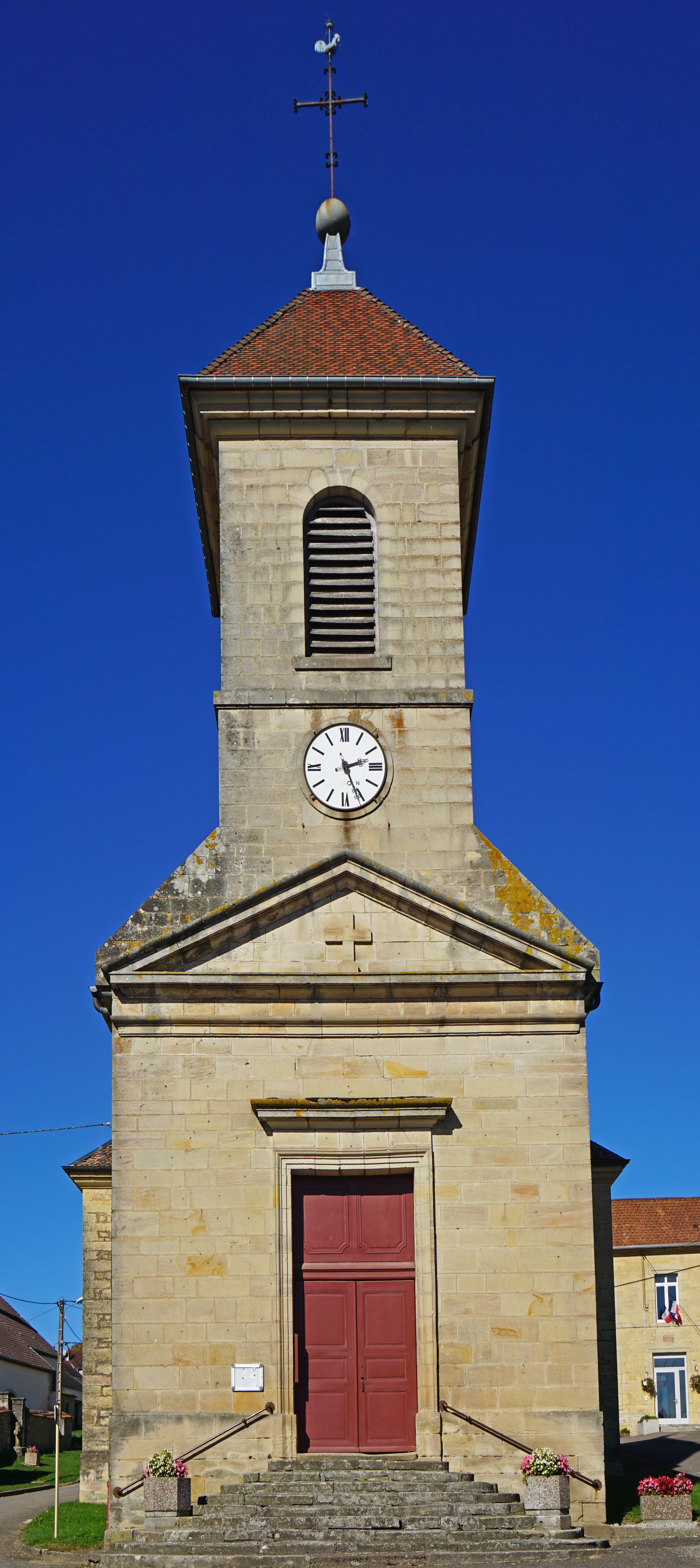 L’église de Genevreuille.